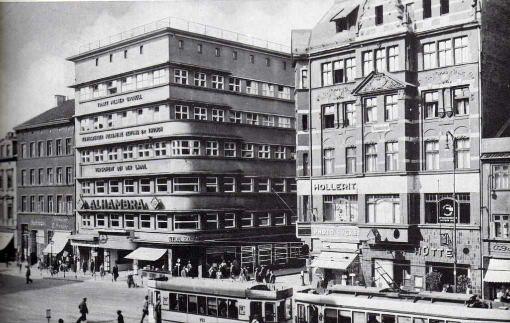 Das Kino Alhambra auf dem Steindamm in Könisgsberg